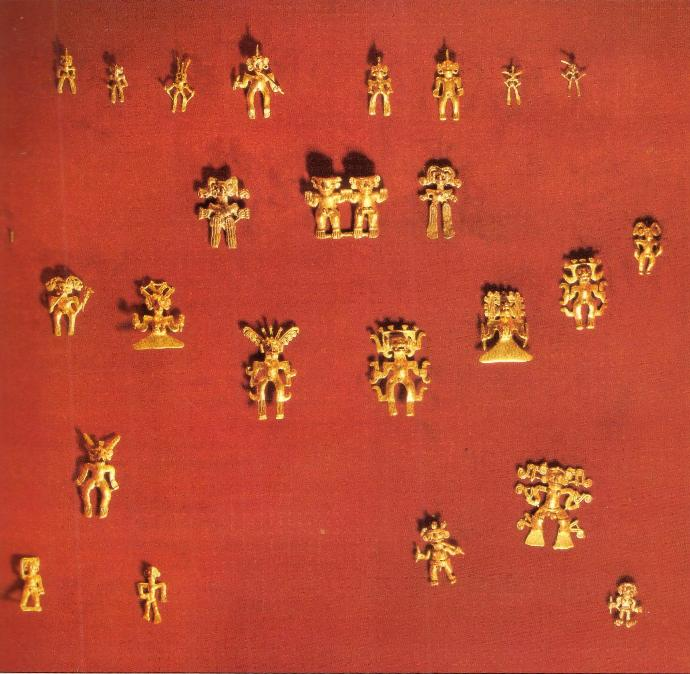 Piezas de oro precolombinas costarricenses, encontradas en el Valle del General (Pacífico Sur costarricense). Museo del Oro, San José de Costa Rica.